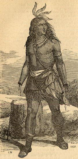 Galvarino (?-1557) fue un guerrero mapuche perteneciente a las filas de Lautaro.